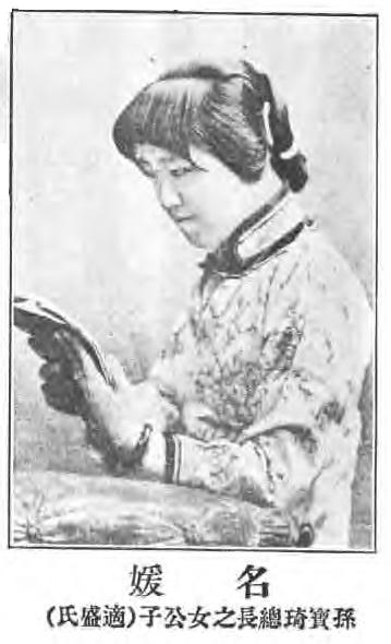 治家全書圖像